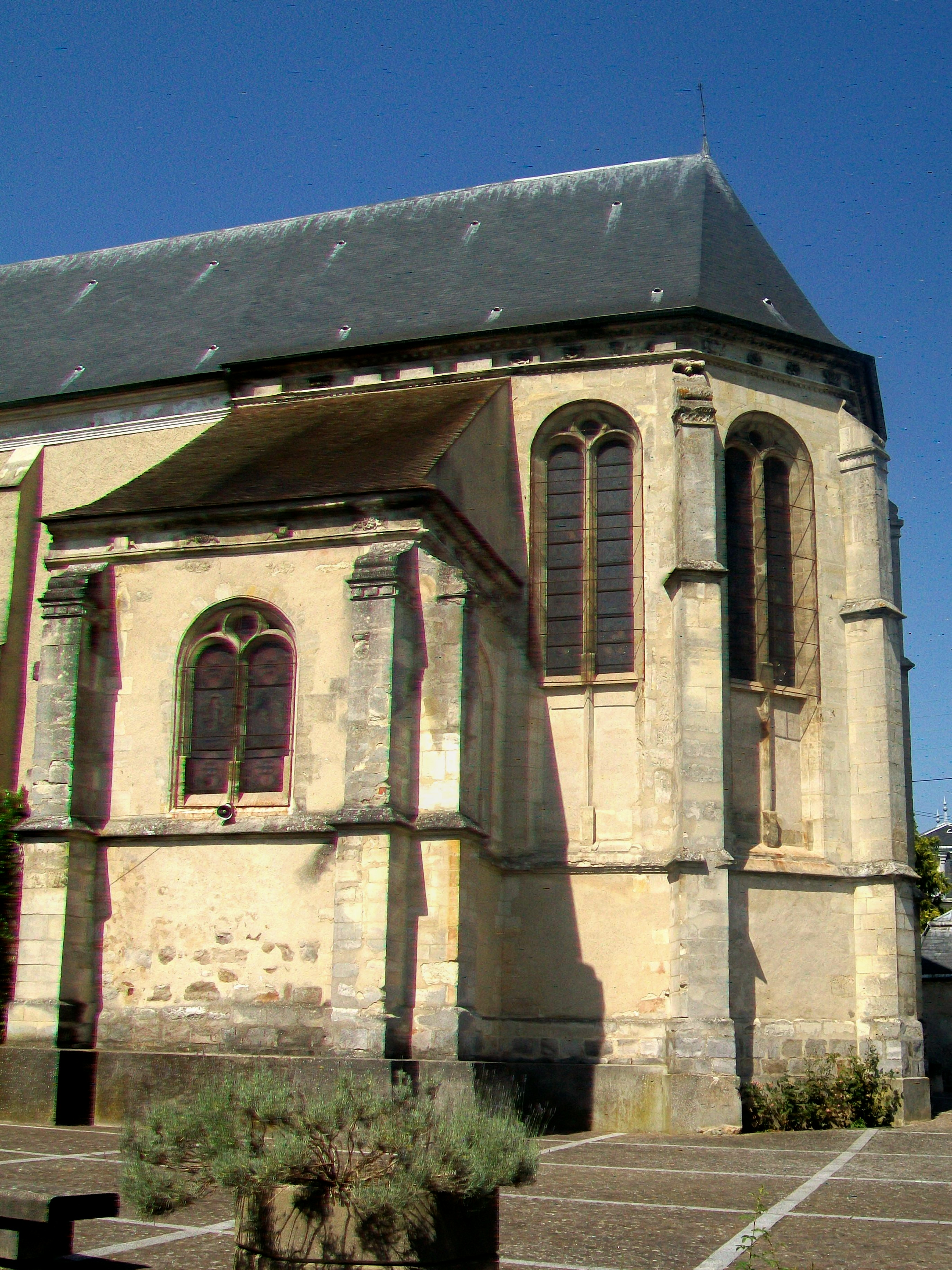 Le chœur, depuis l'est, rue du Four.